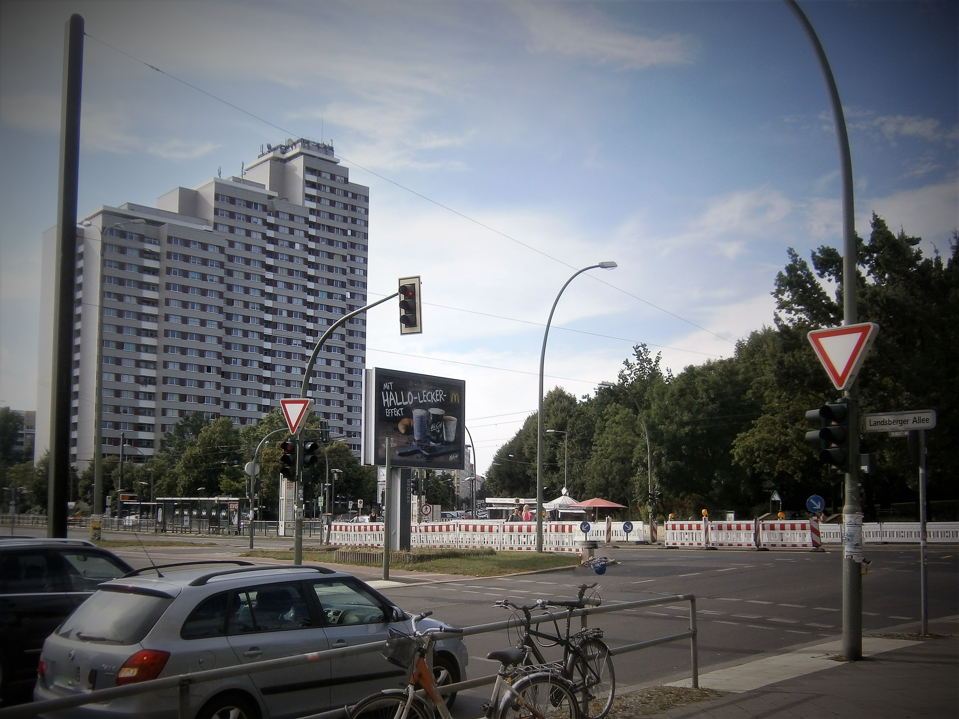 Die Friedenstraße ist eine Straße im Berliner Bezirk Friedrichshain-Kreuzberg, Ortsteil Friedrichshain. Angelegt und benannt wurde sie 1871-1876 auf dem Communicationsweg außerhalb der abgerissenen Berliner Zollmauer. Bereits seit dem Anlegen und der Bebauung bestand eine Teilung der Straße auf Königstadt und Stralauer Viertel. Aktuell sind es drei unterschiedene Straßenabschnitte: regionale Straßenverbindung im Barnimkiez am Volkspark Friedrichshain, am Platz der Vereinten Nationen als Parkzone, südlich im (Planungsraum) "Friedenstraße" als Ergänzungsstraße. Das Bild zeigt den Blick über den Landsberger Platz/ Landsberger Straße in die Friedenstraße am Friedrichshain entlang.